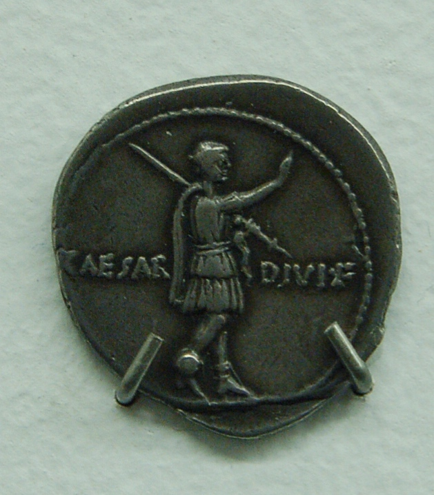 Denier d'Octave, fils du divin César. Exposition au Grand Palais "Moi, Auguste, empereur de Rome" (19 mars 2014-13 juillet 2014)